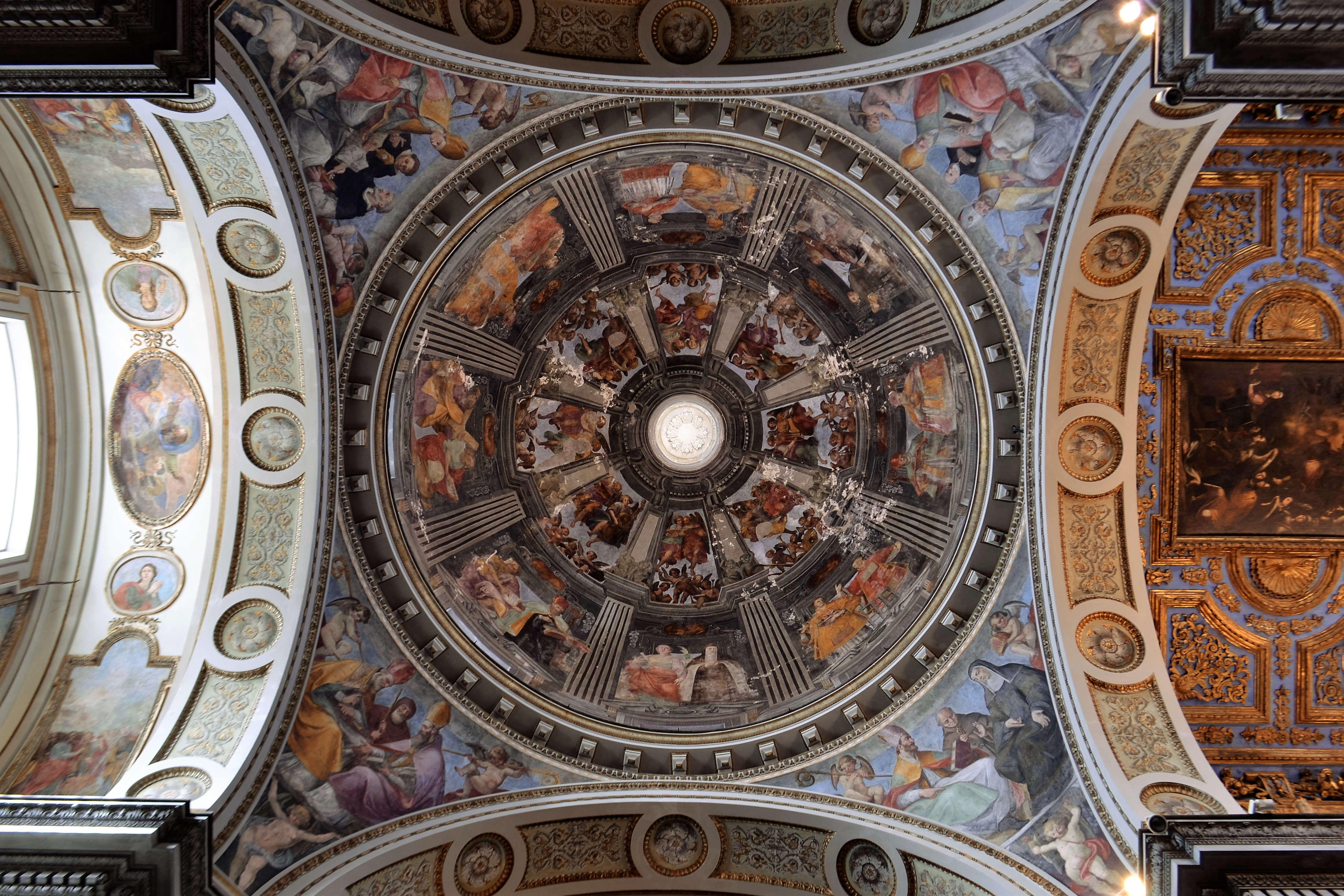 Chiesa dei Santi Marcellino e Festo di Napoli - Cupola